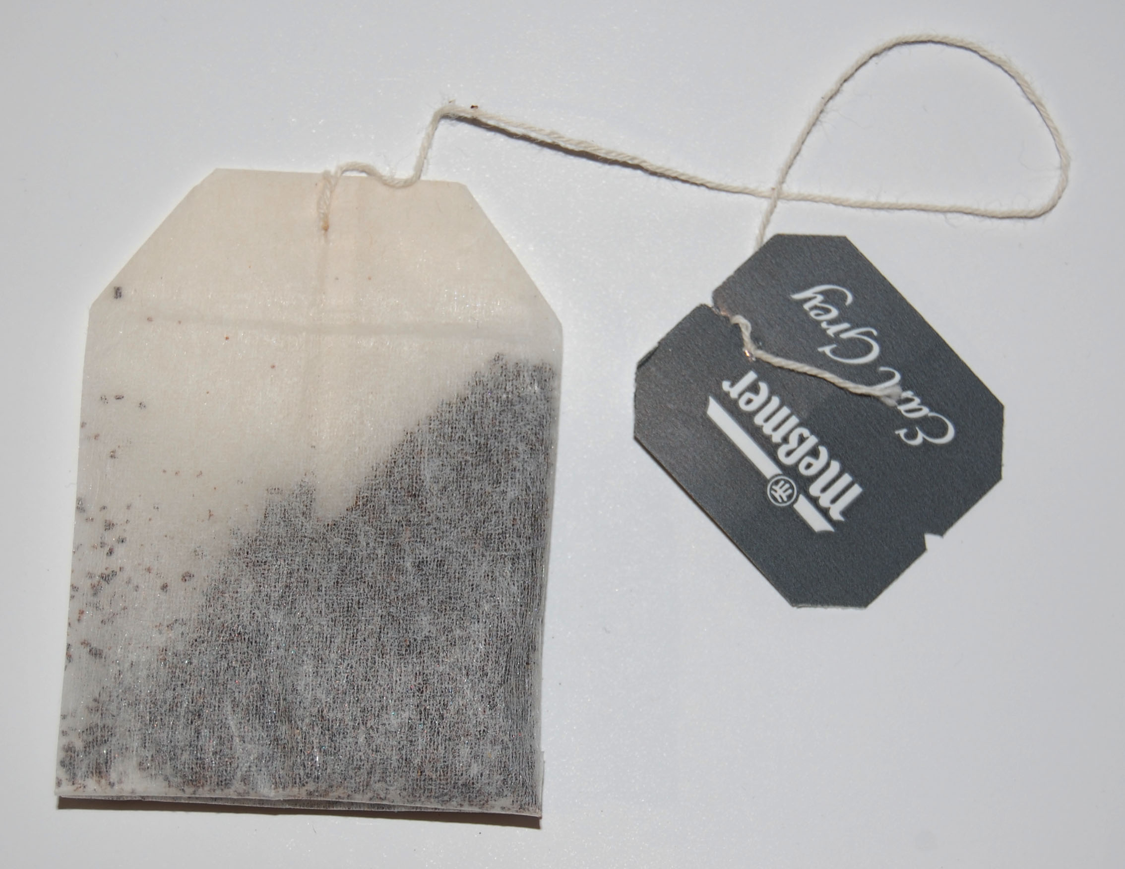 bagged Tea